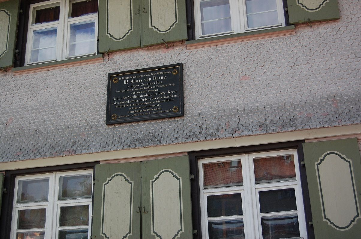 Erinnerungstafel für Alois von Brinz an seinem Geburtshaus in der Alois-von-Brinz-Straße 41, in Weiler im Allgäu